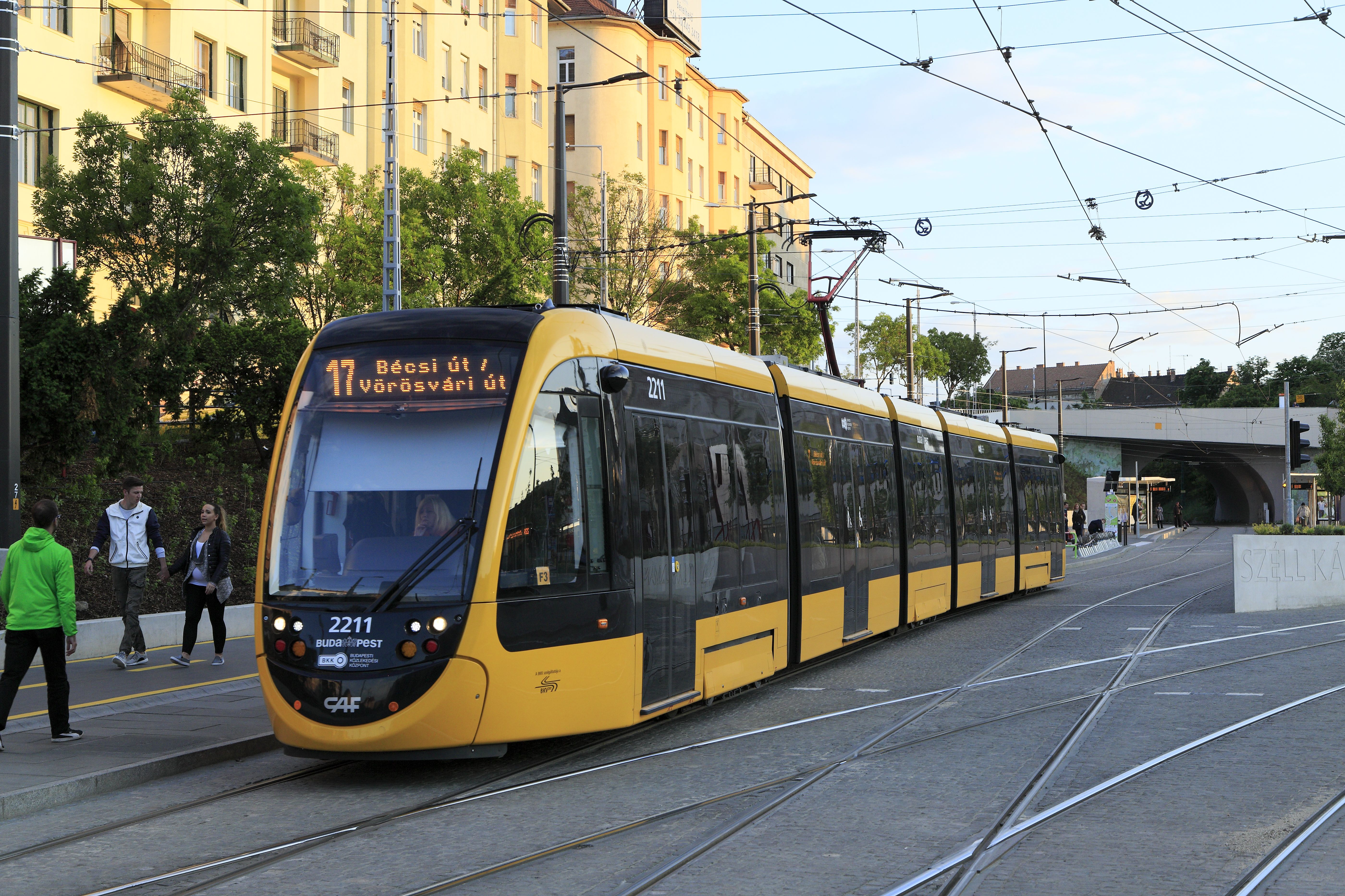 »Urbos 3« von CAF, Linie 17 Savoya Park–Bécsi út (Wiener Straße) beim Verlassen der Haltestelle Széll Kálmán tér Richtung Margit körút. Die Urbos 3 sind wieder Multigelenkwagen mit auffallend großen Überhängen an den Wagenenden.